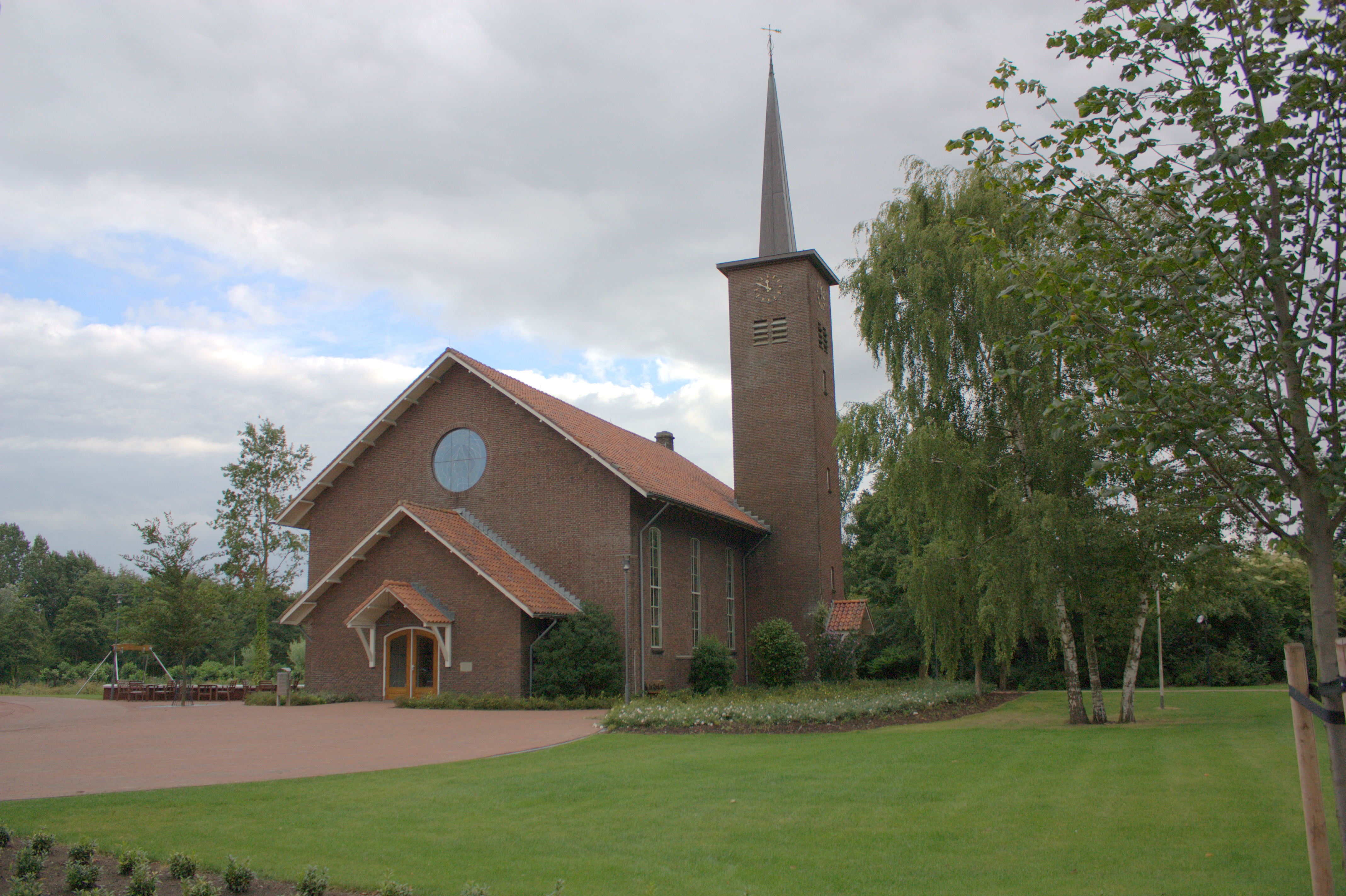 De kerk in De Glind